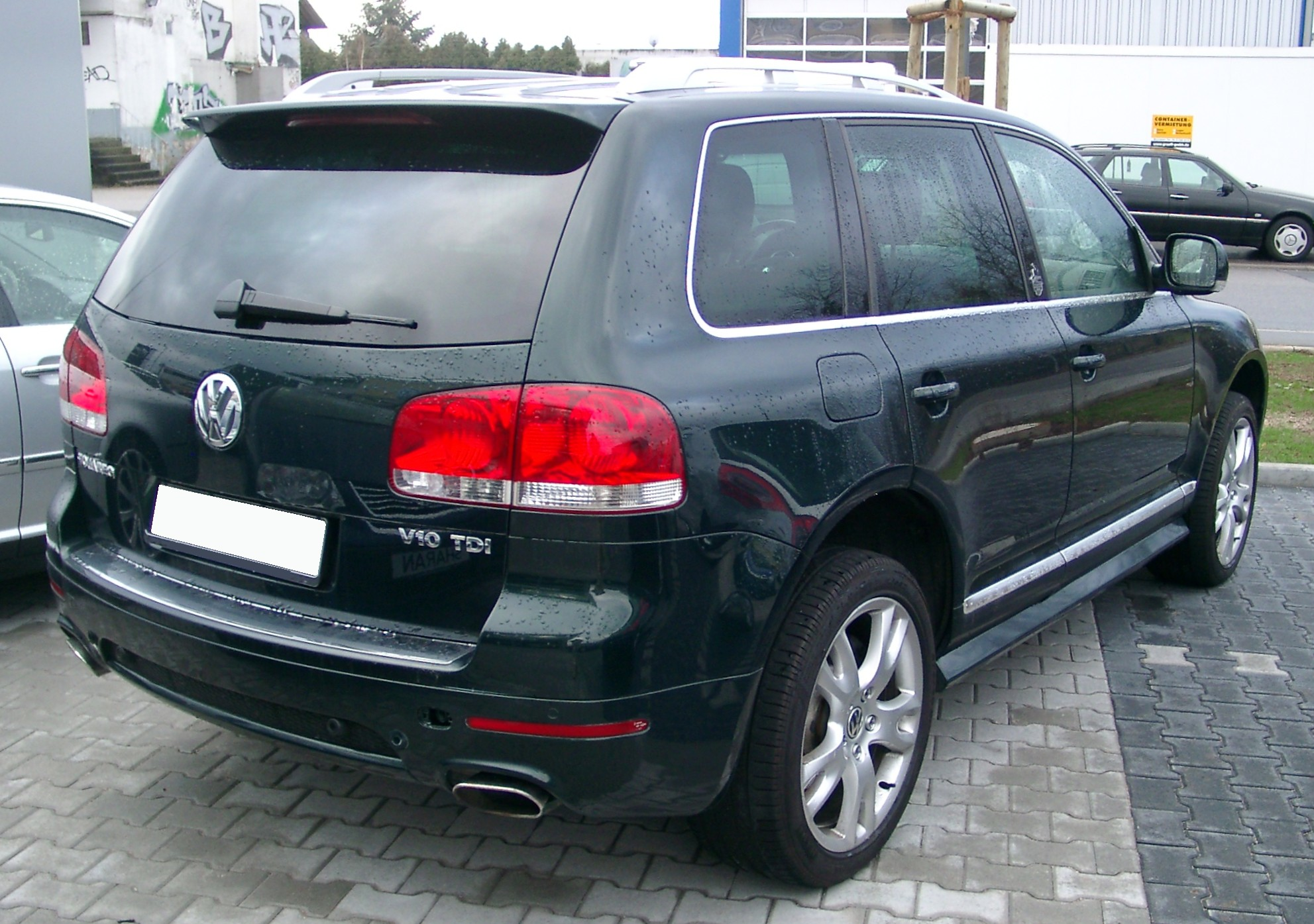 VW Touareg